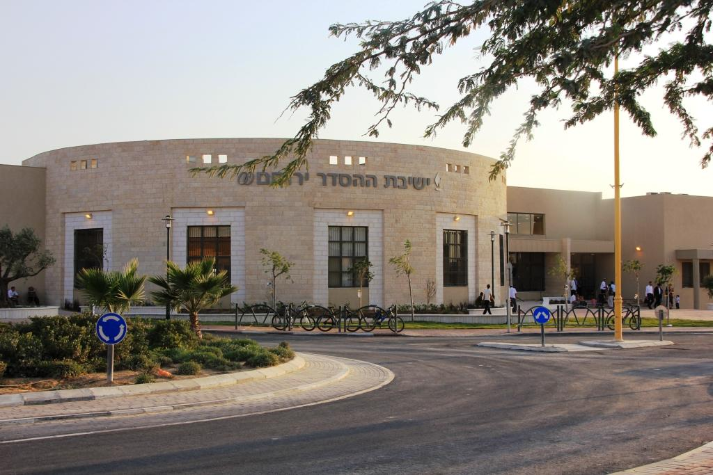 הבנין החדש של ישיבת ההסדר ירוחם